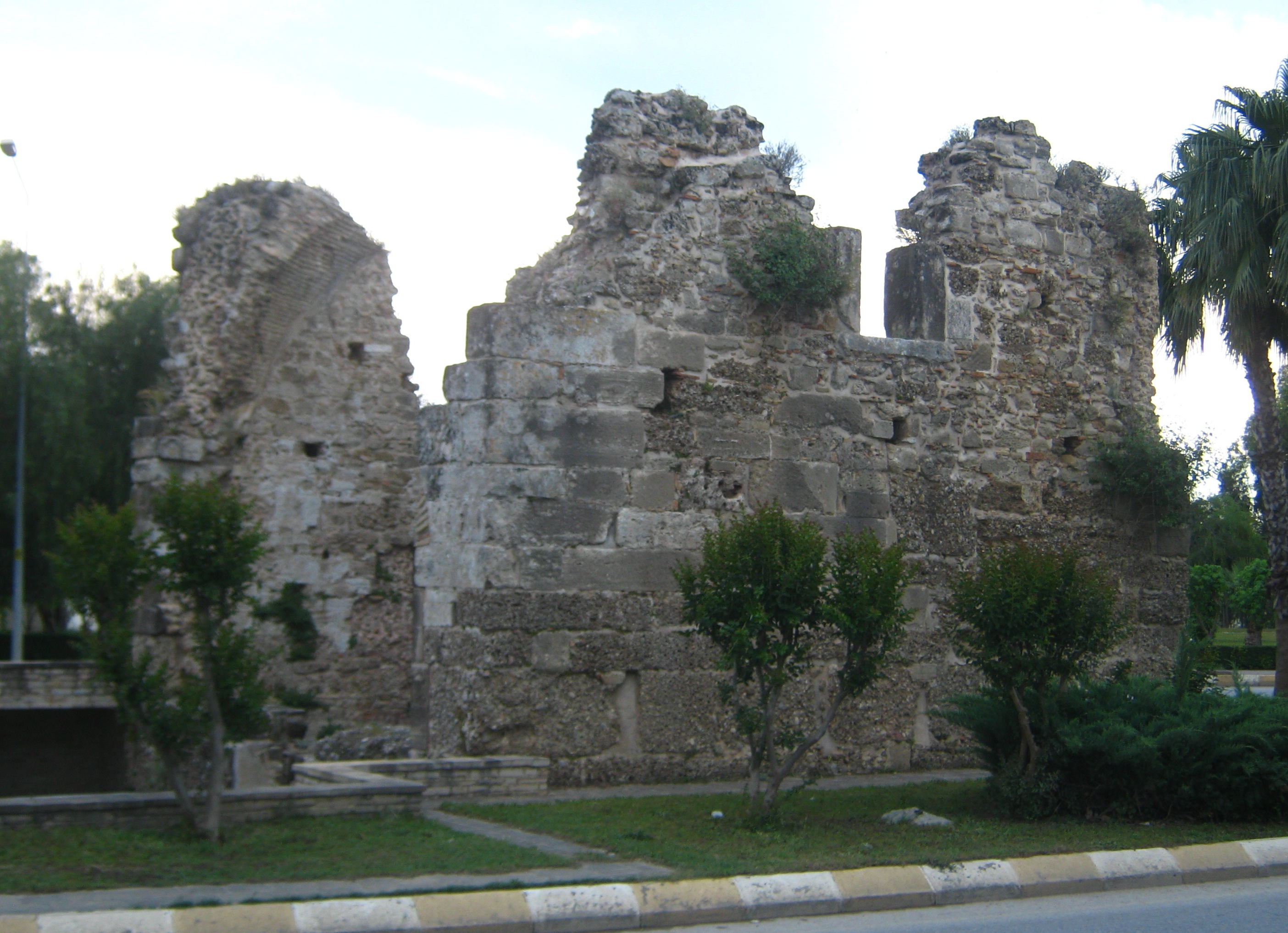 Мавзолей у "Східному" некрополі